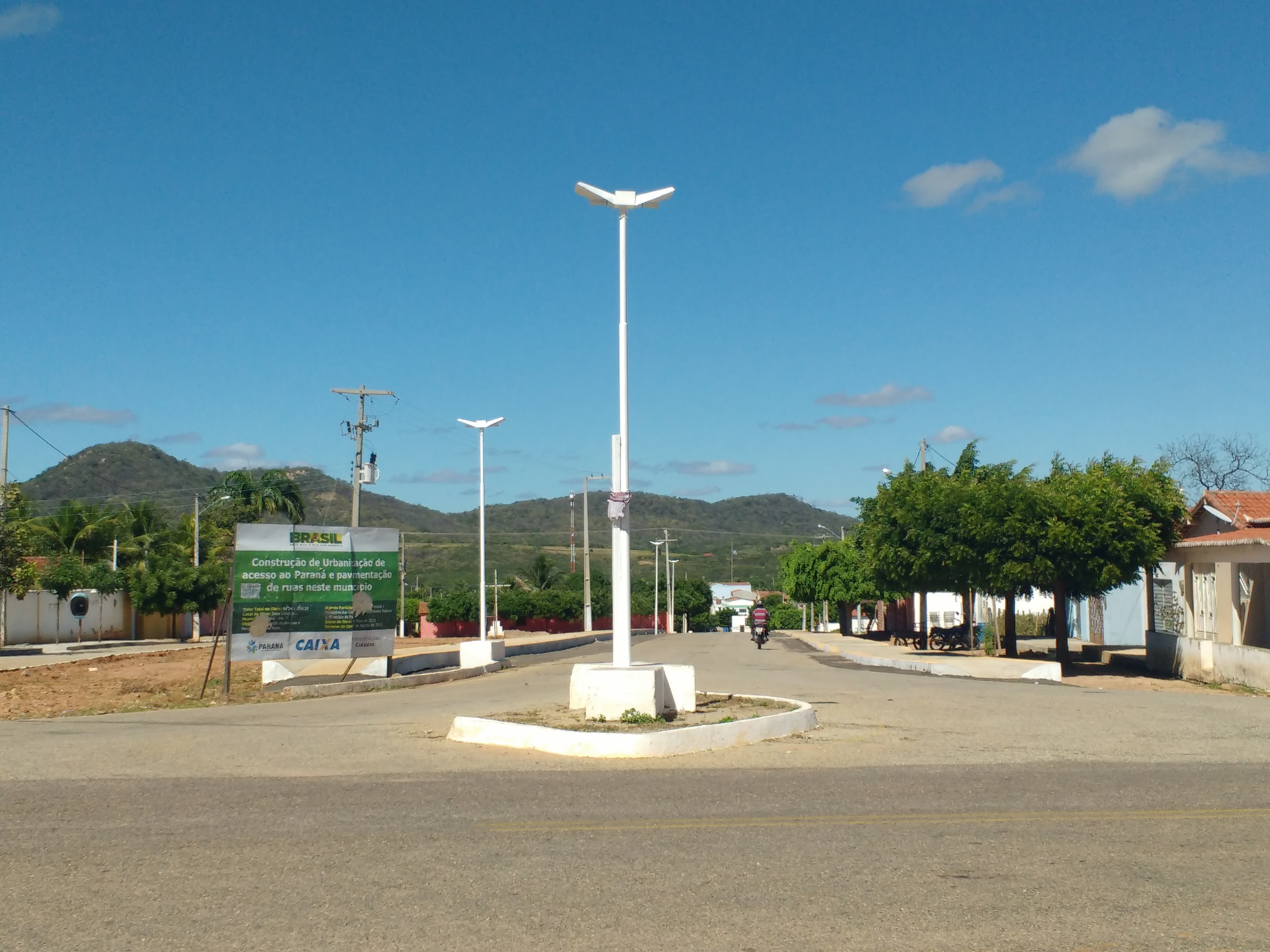 Rua São José, na entrada da cidade de Paraná, Rio Grande do Norte (Brasil).